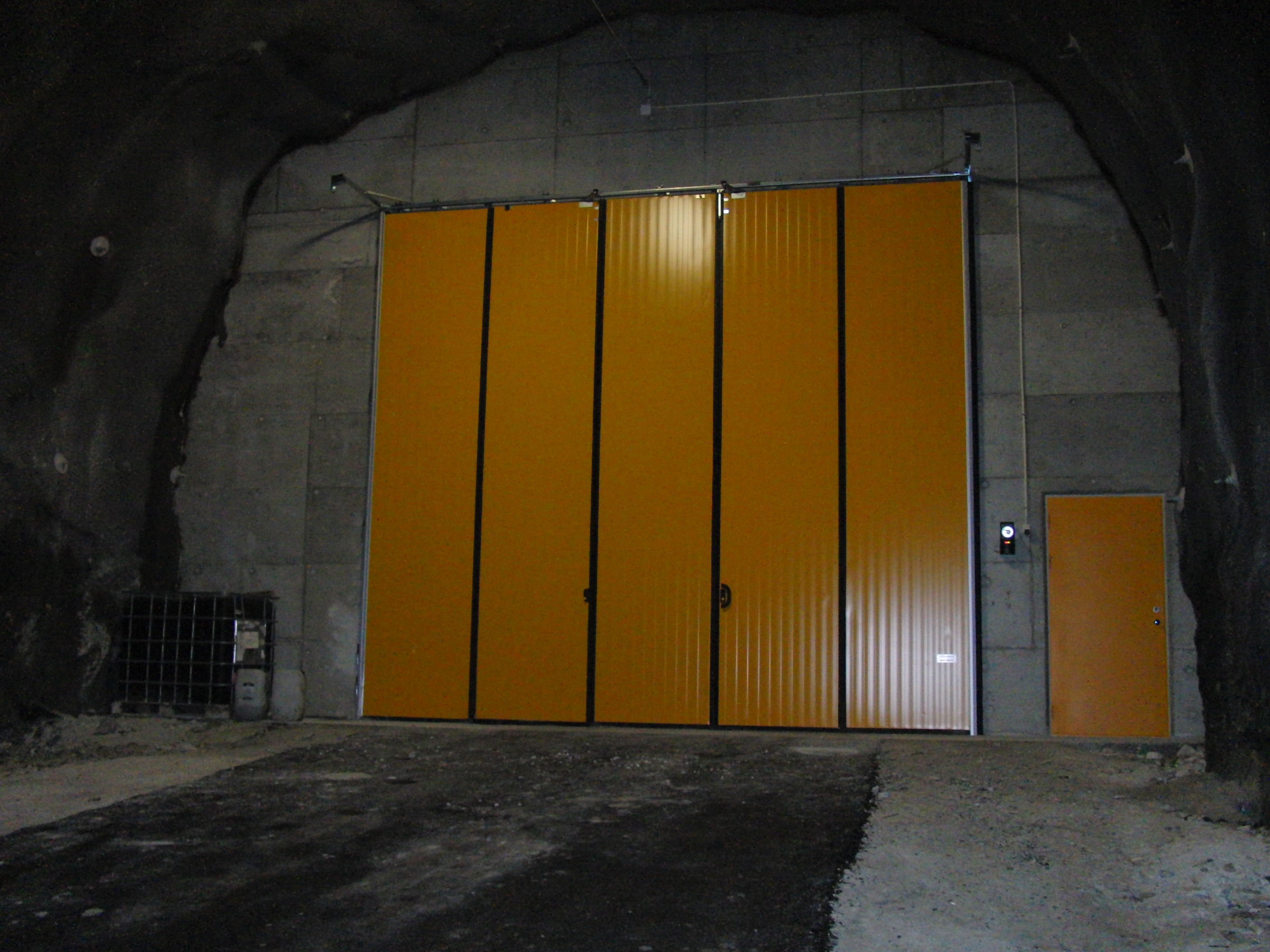 Holmen kraftverk